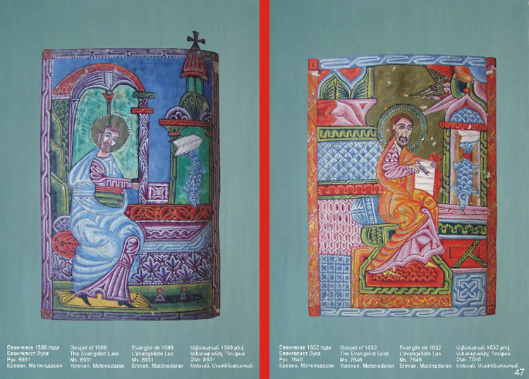 Առաքել Գեղամեցի